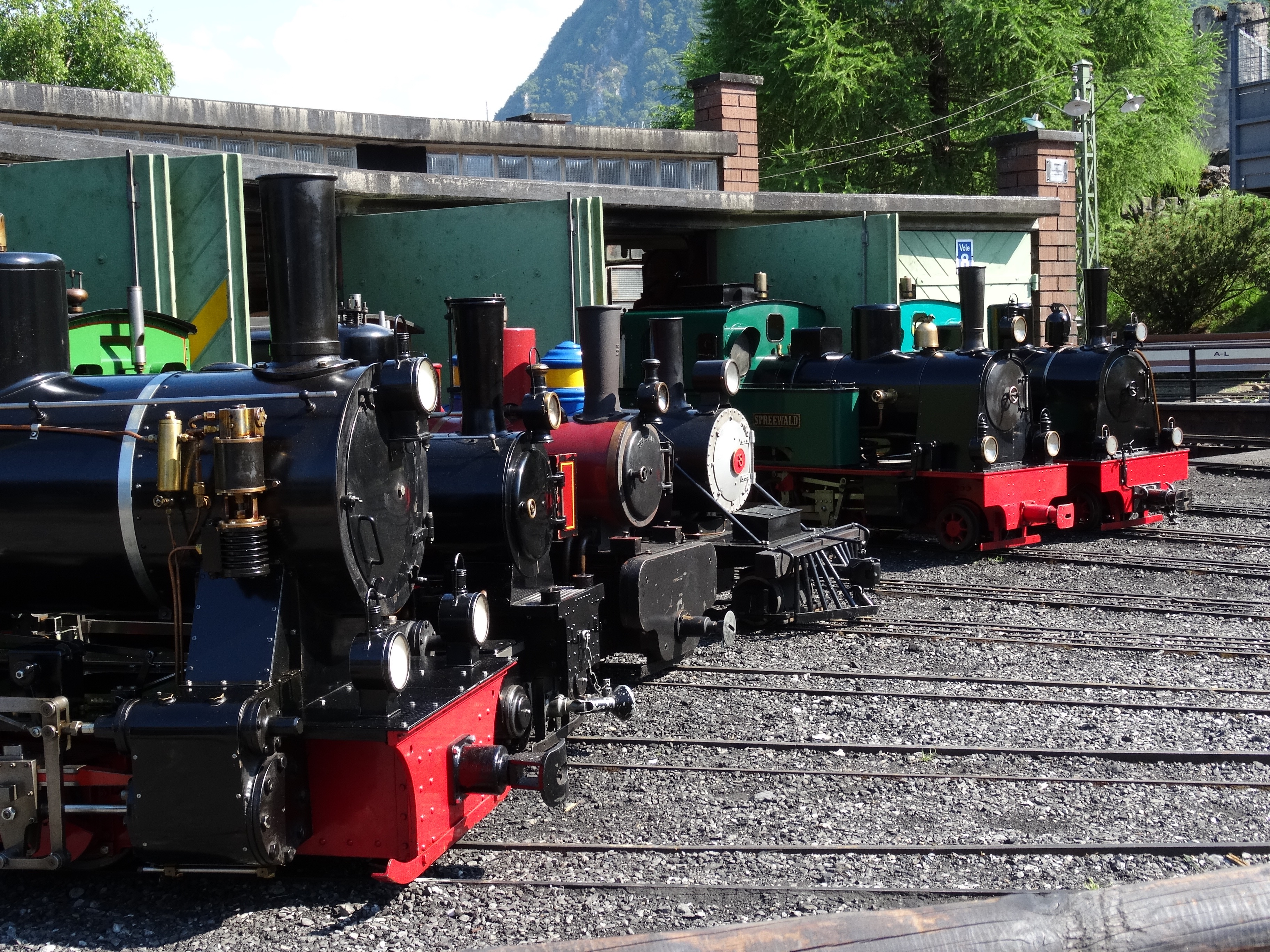 Les locomotives du Swiss Vapeur parc : de gauche à droite, la Mecklenburg, la Waldenburg, la Stuart, la Sandy, la Spreewald et une locomotive privée rassemblées au dépôt 1.